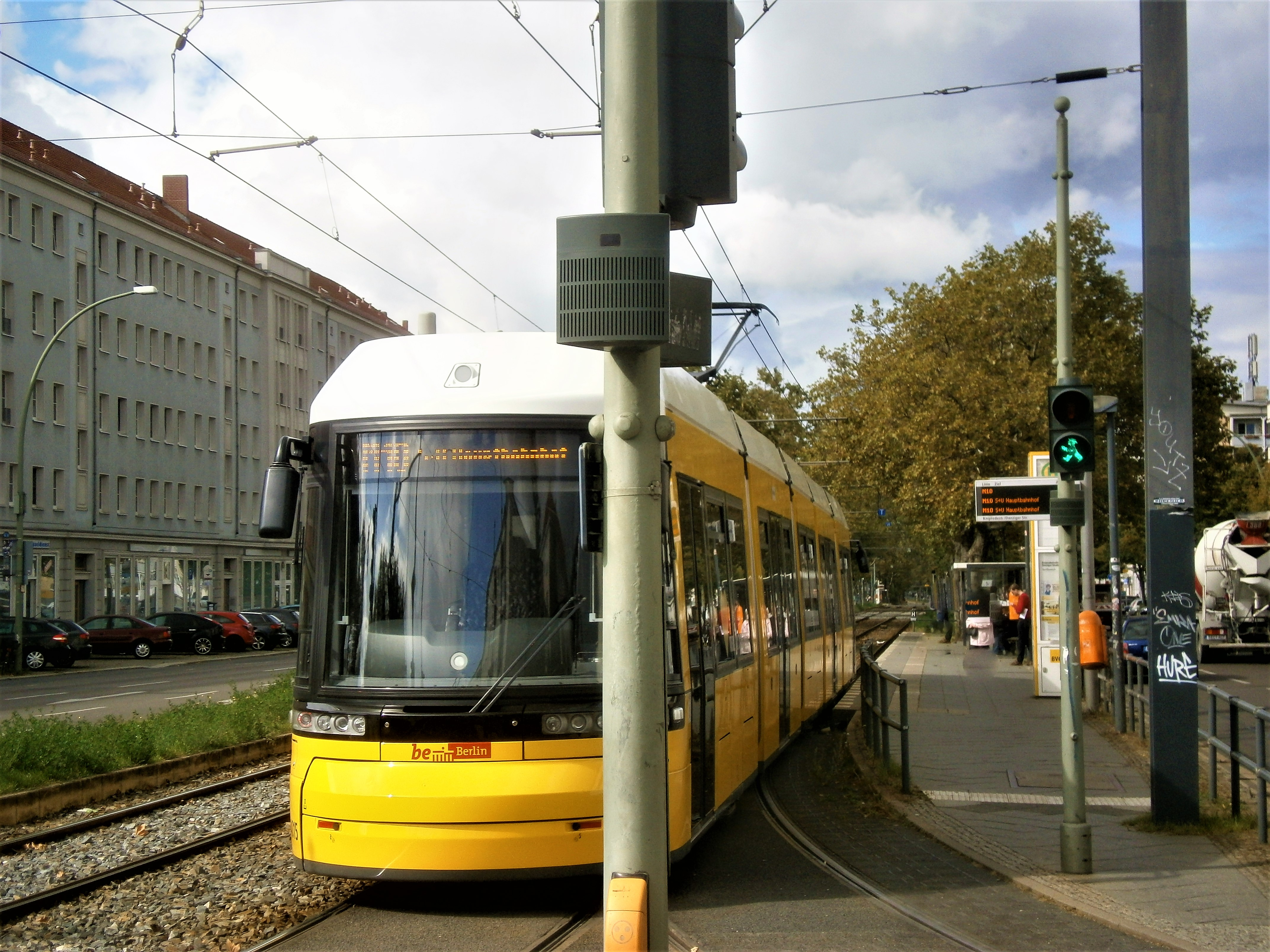 Die Kniprodestraße ist ein Verkehrszug im Berliner Bezirk Pankow, Ortsteil Prenzlauer Berg mit Grundstückszählung in Hufeisen. Bild:Straßenbahnzug der M10 von der Kreuzung Kniprodestraße in die westlichere Danziger Straße